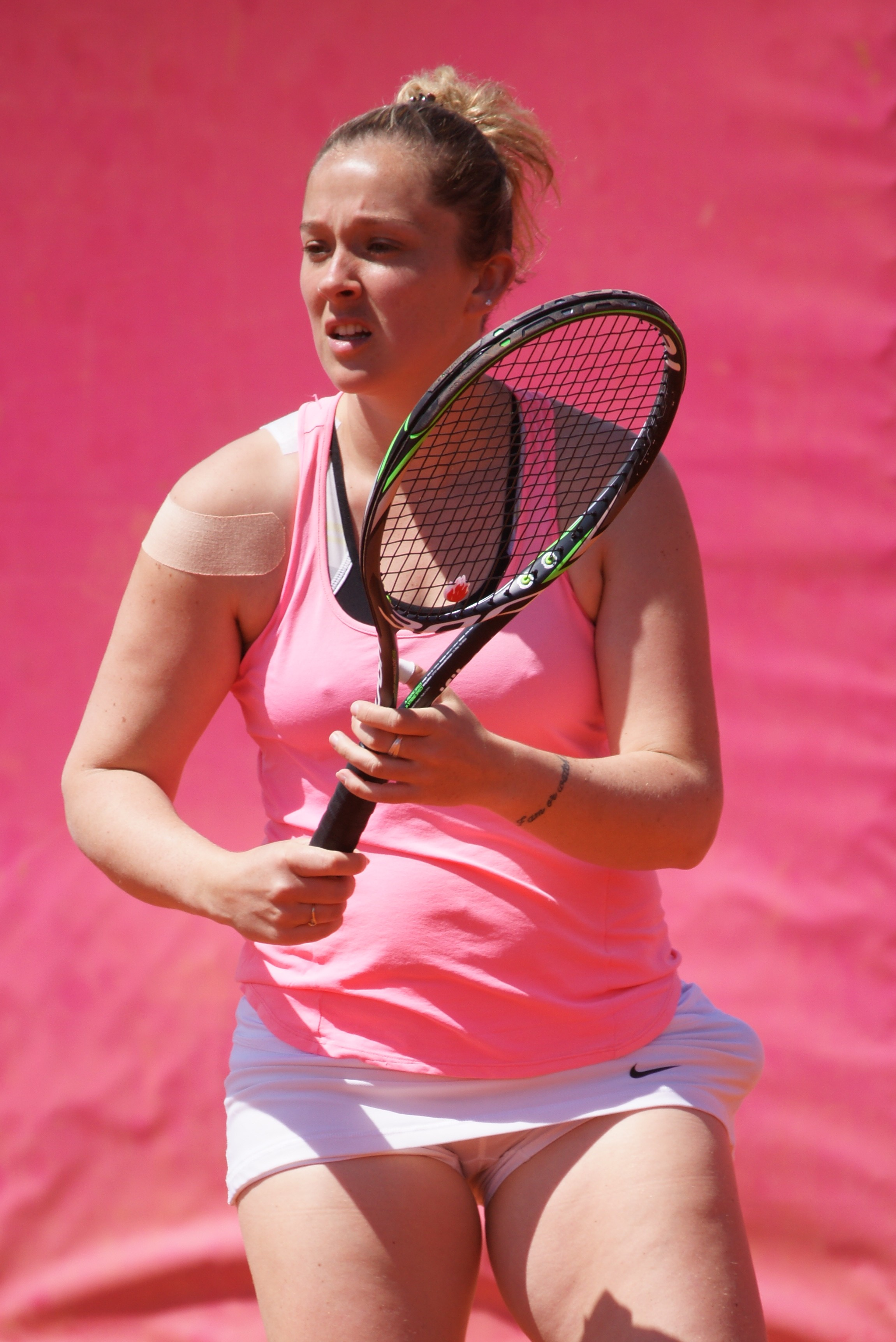 Kinnie Laisné Open ITF Cagnes 2016